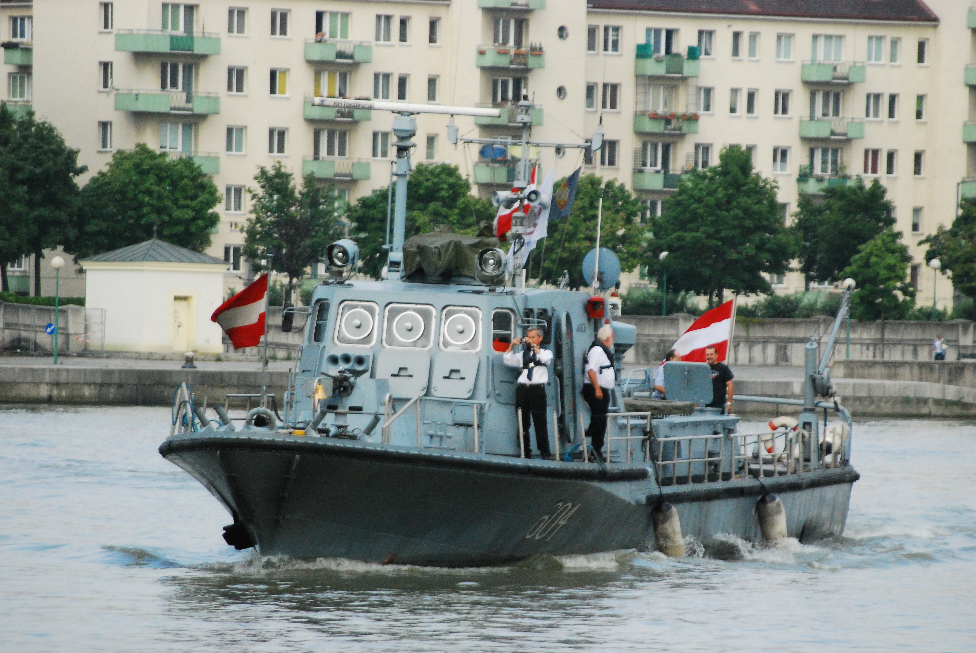 Die Niederösterreich auf der Fahrt vom Liegeplatz unter der Reichsbrücke zur Lissa-Feier.